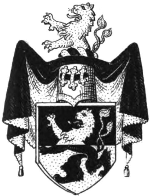 Wappen der Freiherren von Kalm (teilweise auch "Calm" geschrieben). Schild quergeteilt von schwarz und gold. Darin eine doppelgeschwänzter Löwe wechselnder Tinktur.